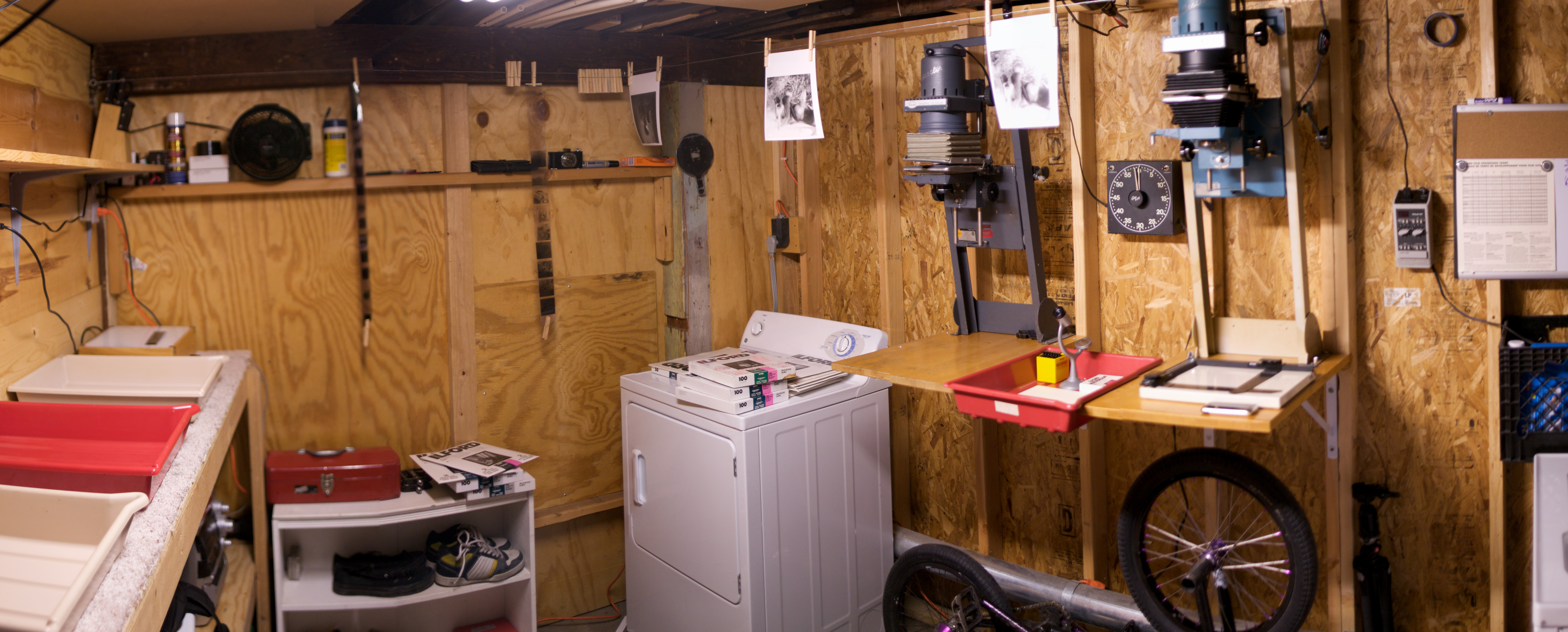 darkroom pan